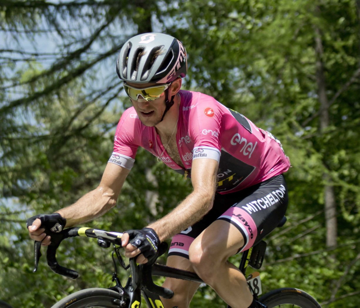 GIR40263 simon yates